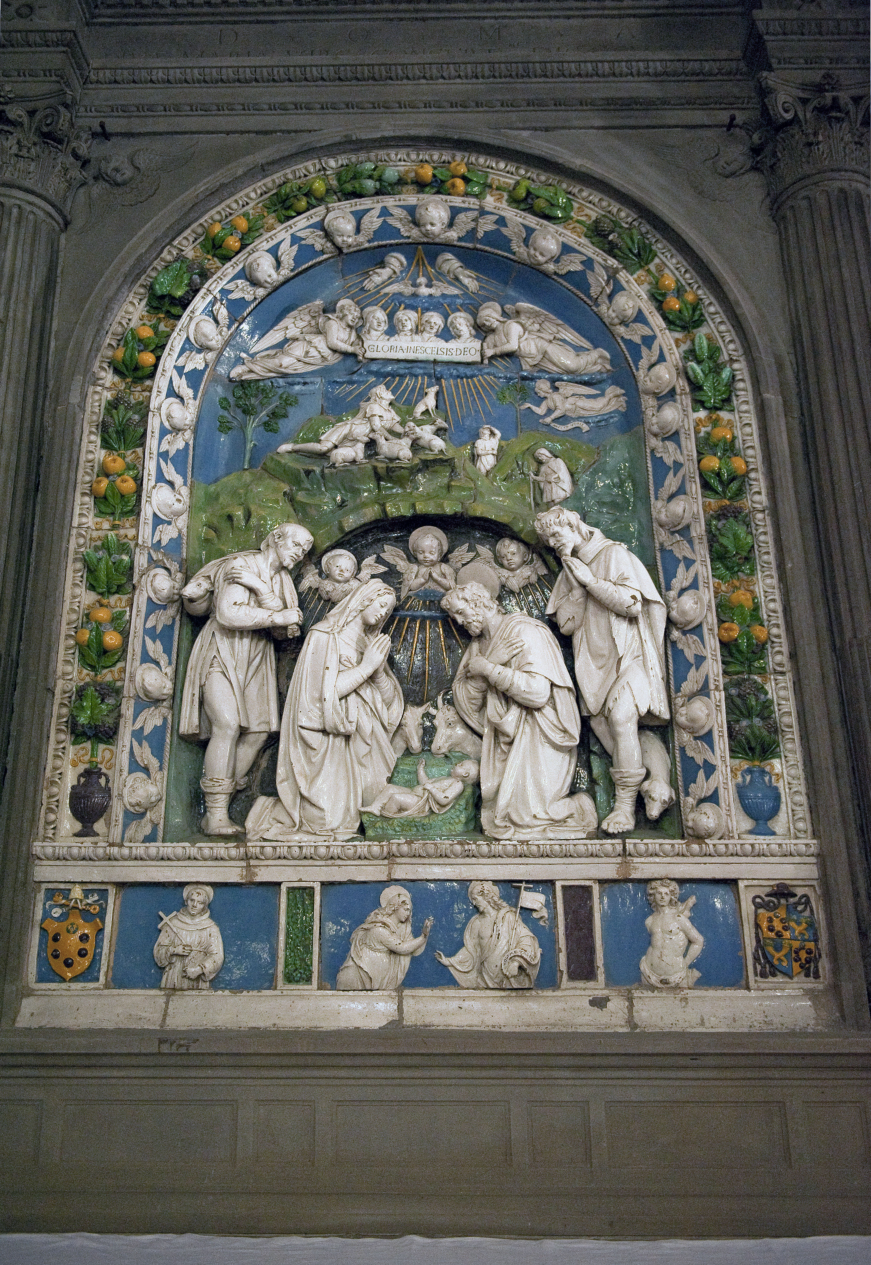 Nascita del Salvatore di Andrea della Robbia - Bibbiena, chiesa di San Lorenzo